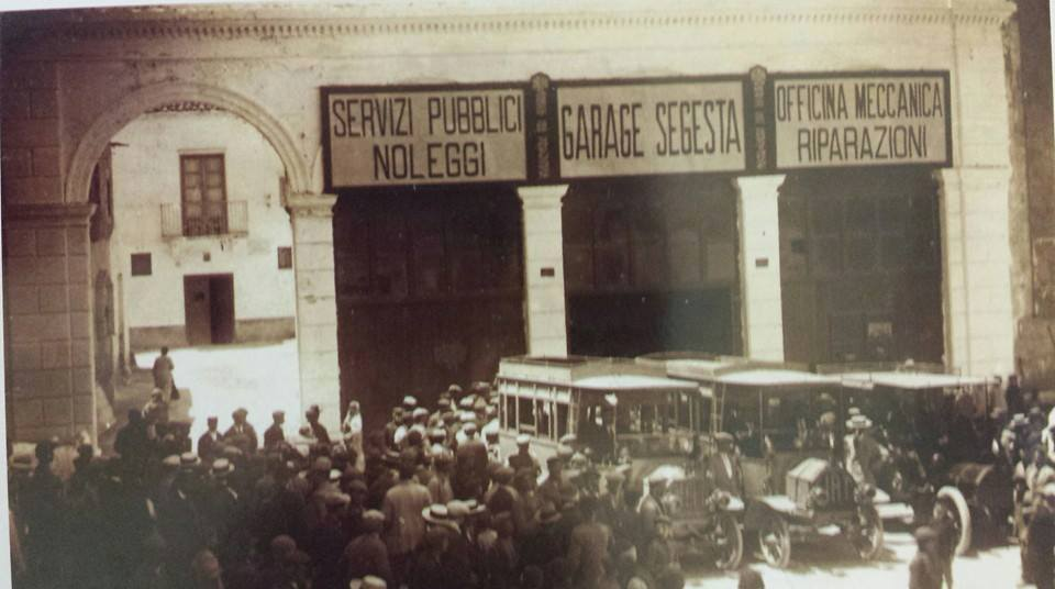 Vecchia foto del Collegio dei Gesuiti - 02